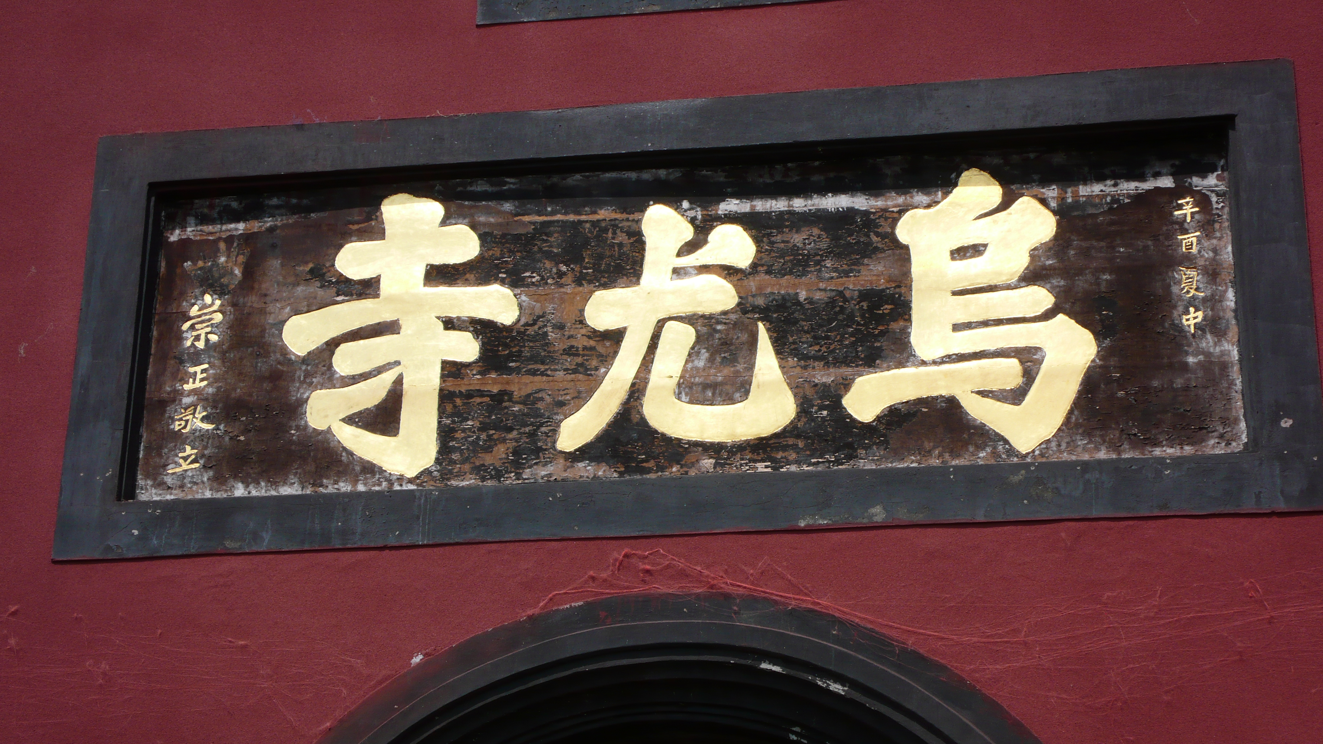 中文（台灣）: 烏尤寺寺額